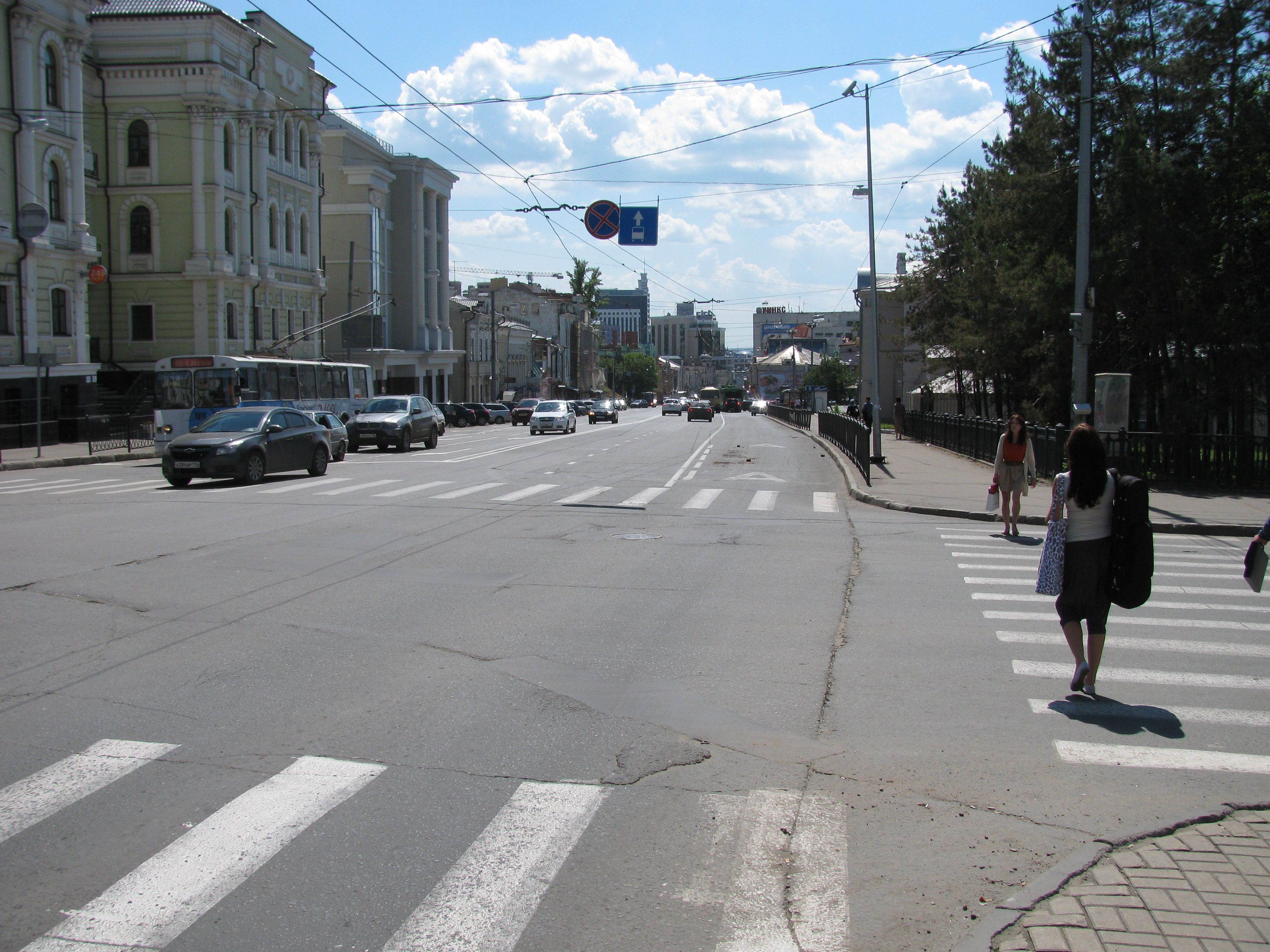 Улица Пушкина в сторону Кольца